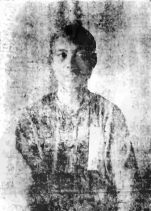 中文（台灣）: 廖添丁照片Bân-lâm-gú: 廖添丁(Liāu Thiam-teng)